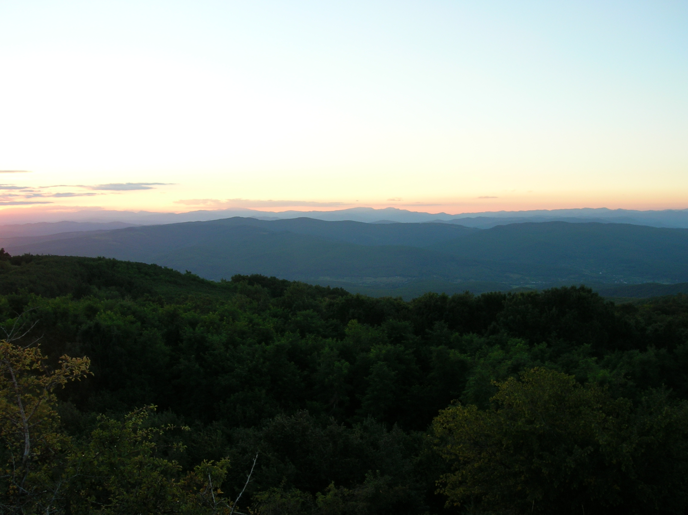 Dealul Istrița, județul Buzău, România: perspectivă de seară din vârful dealului spre valea Nișcovului, dealul Ciolanu și dealul Salcia (în stânga)